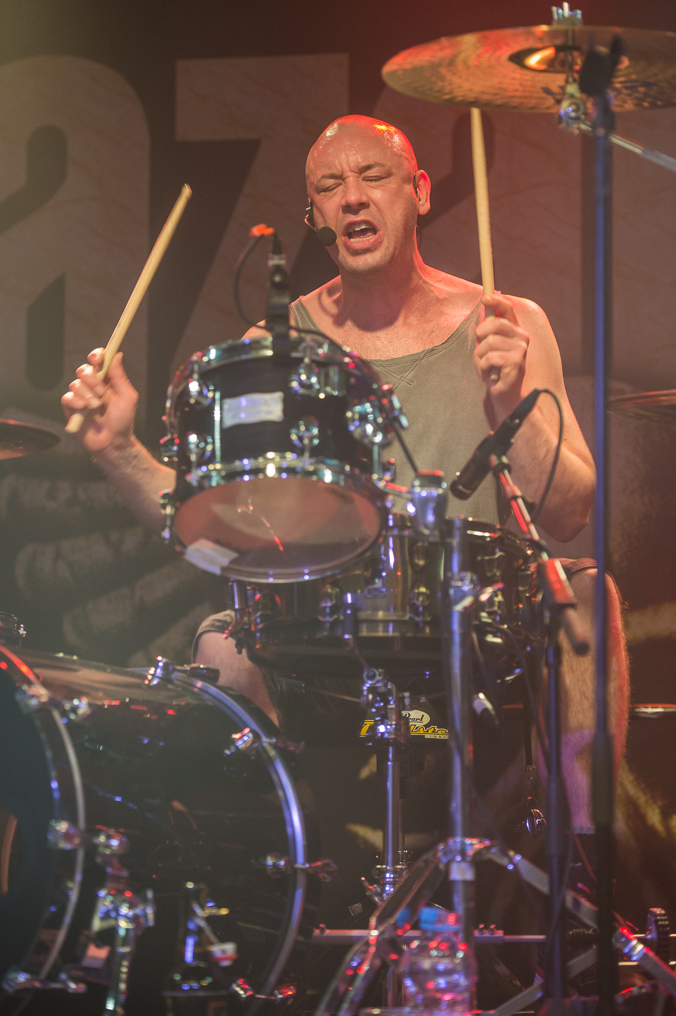 Concertbüro Franken,Der Hirsch,Konzert,Lee Agnew,Livekonzert,Livemusik,Musik,Nazareth